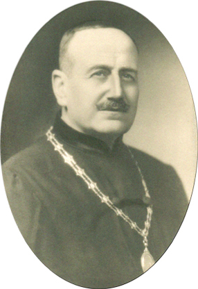 Portugal Século XX / 20TH Century Advogado / Lawyer Genealogista / Genealogist